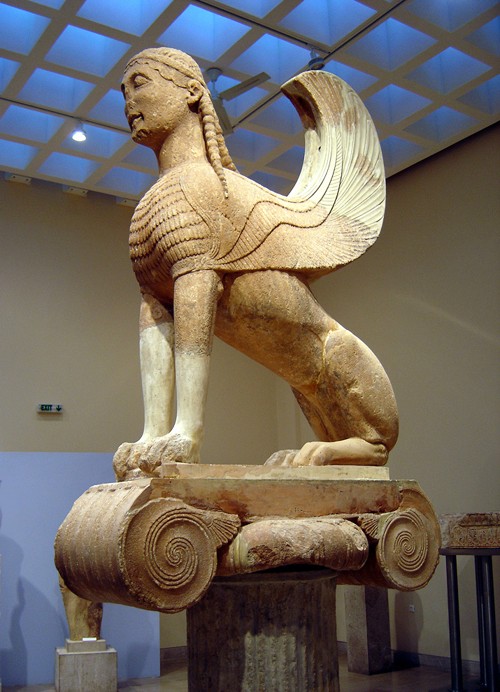 Sfinge votiva originariamente posta su di un'alta colonna con capitello ionico di forma appiattita presso il Tempio di Apollo a Delfi.